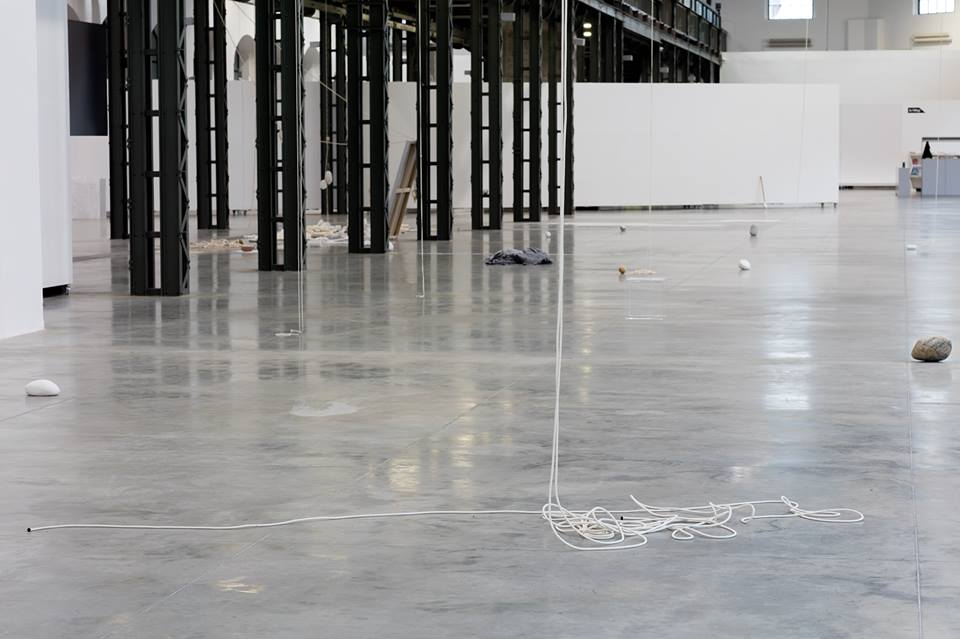 Výstava Denisy Lehocké Luno 550